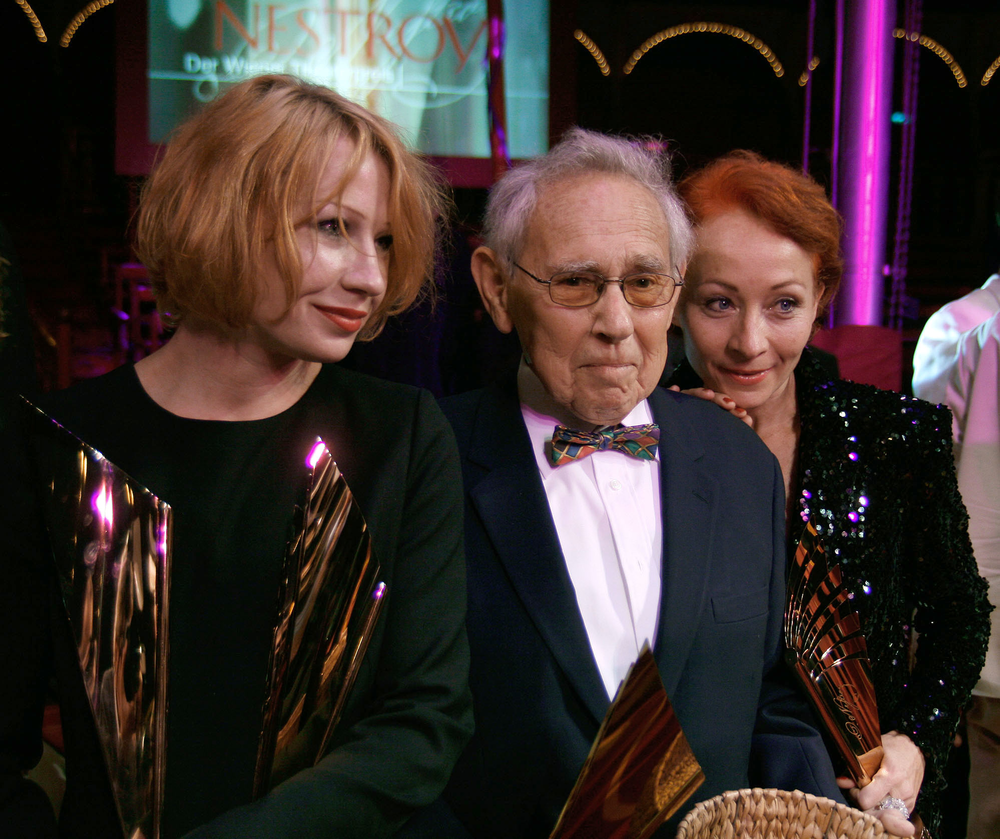 Birgit Minichmayr, Otto Tausig und Sona MacDonald während der Verleihung des Nestroy-Theaterpreises 2009 (Circus Roncalli auf dem Wiener Rathausplatz).